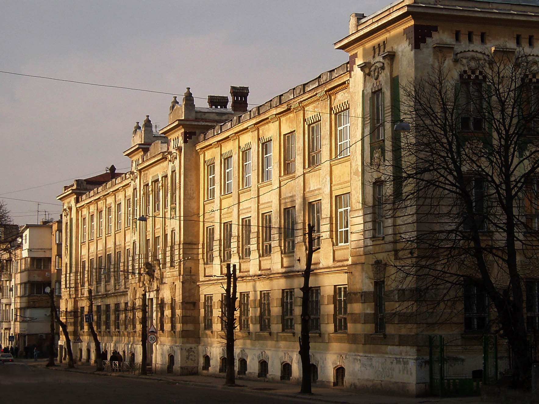 Будівля Художьно-промислової школи на вулиці Снопківській, 47 у Львові. Нині Львівський державний коледж декоративного та ужиткового мистецтва імені Івана Труша та Технікум залізничного транспорту.